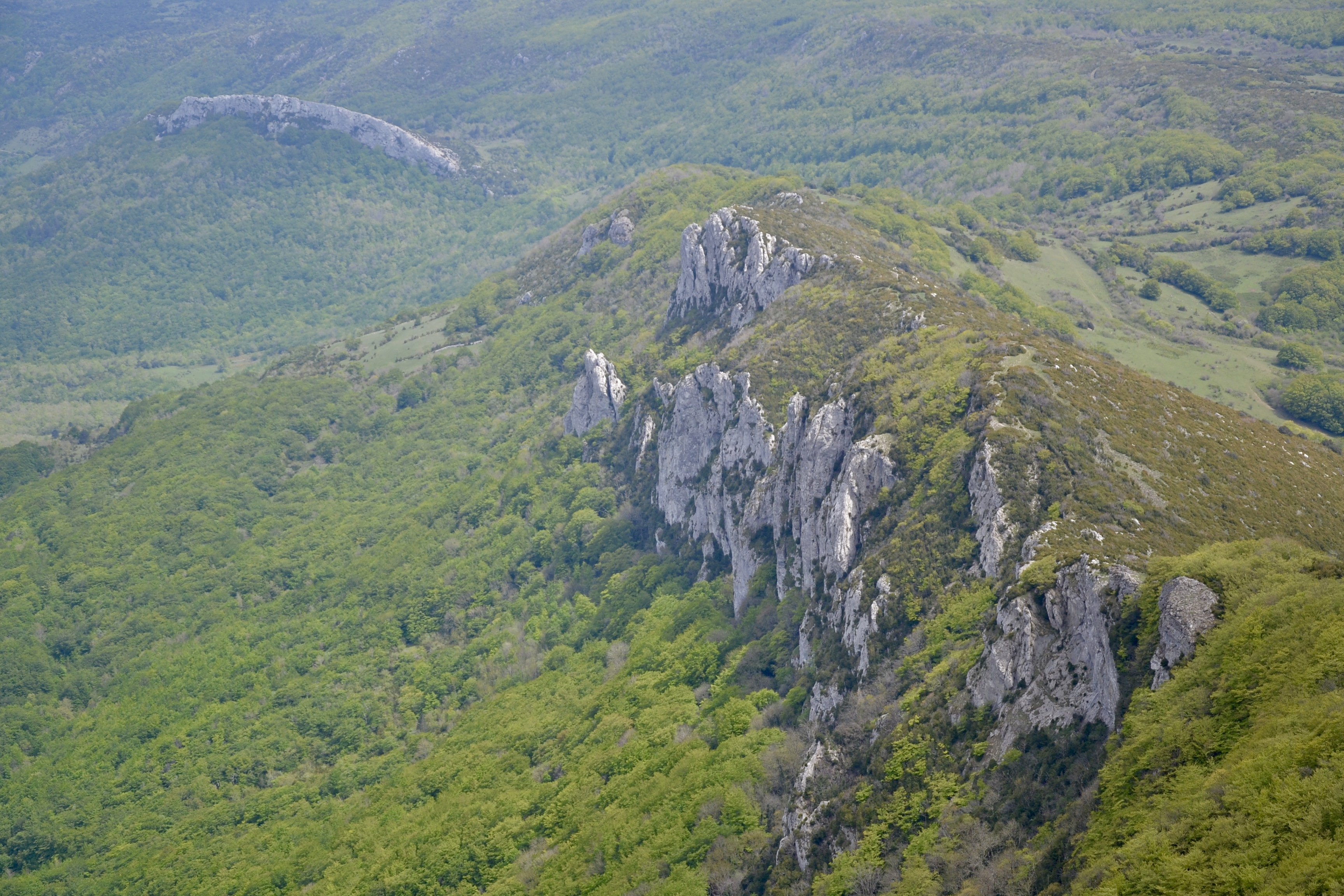 Paysage depuis le pech de Bugarach (Aude, France).